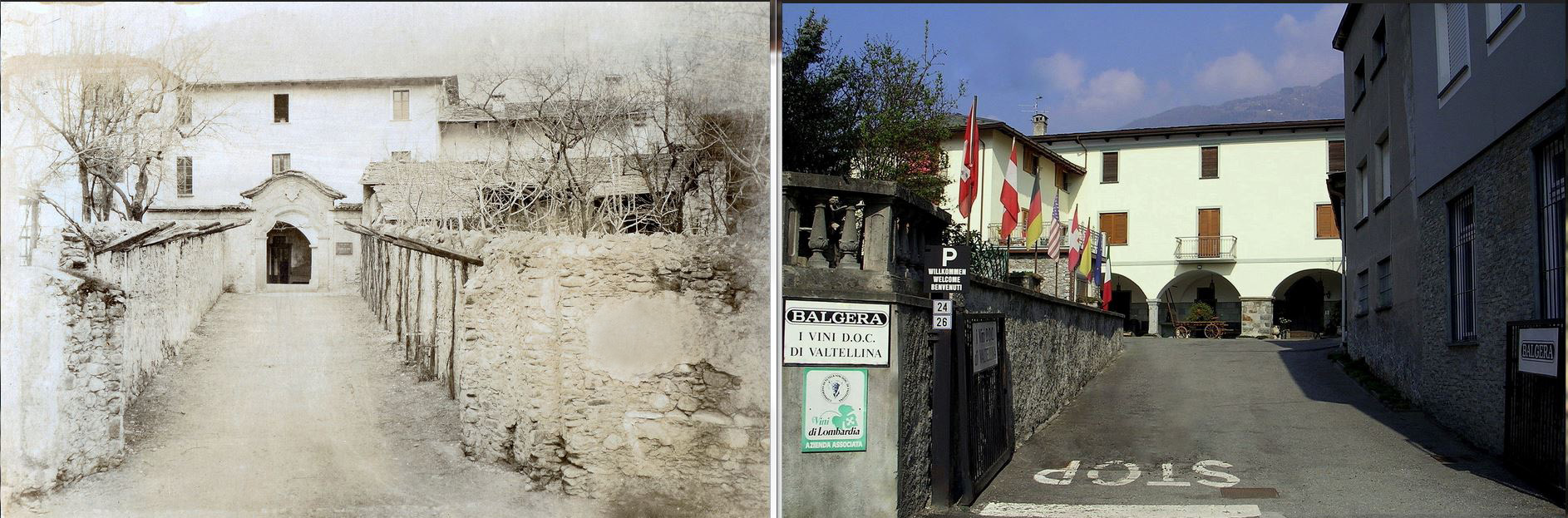 Casa avita di Maurizio Quadrio in Chiuro (SO) Italia - Come'era e come è oggi: sede prestigiosa dell' Azienda Vitivinicola Balgera.